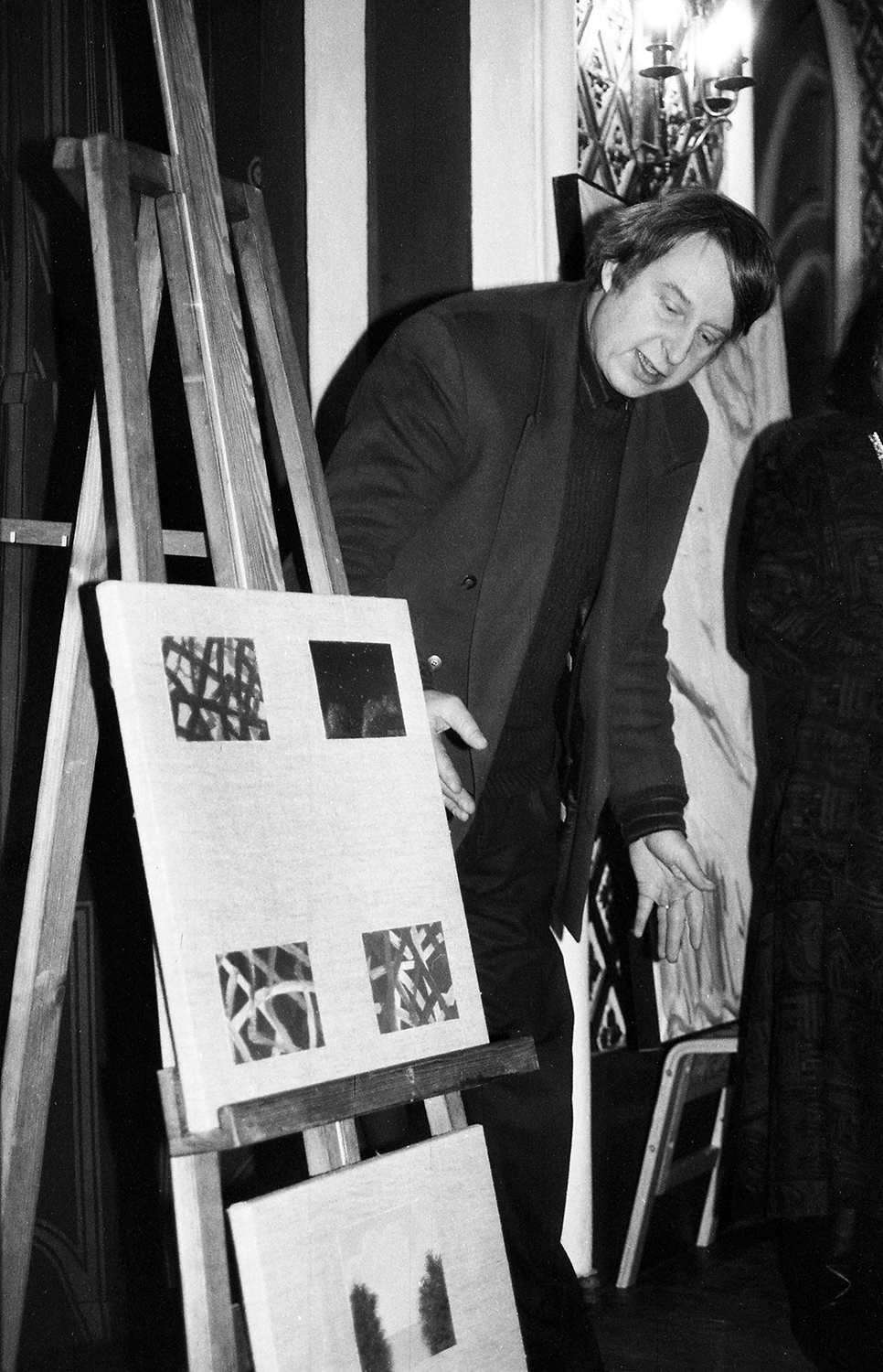 Andres Tolts, maalikunstnik ja graafik 94